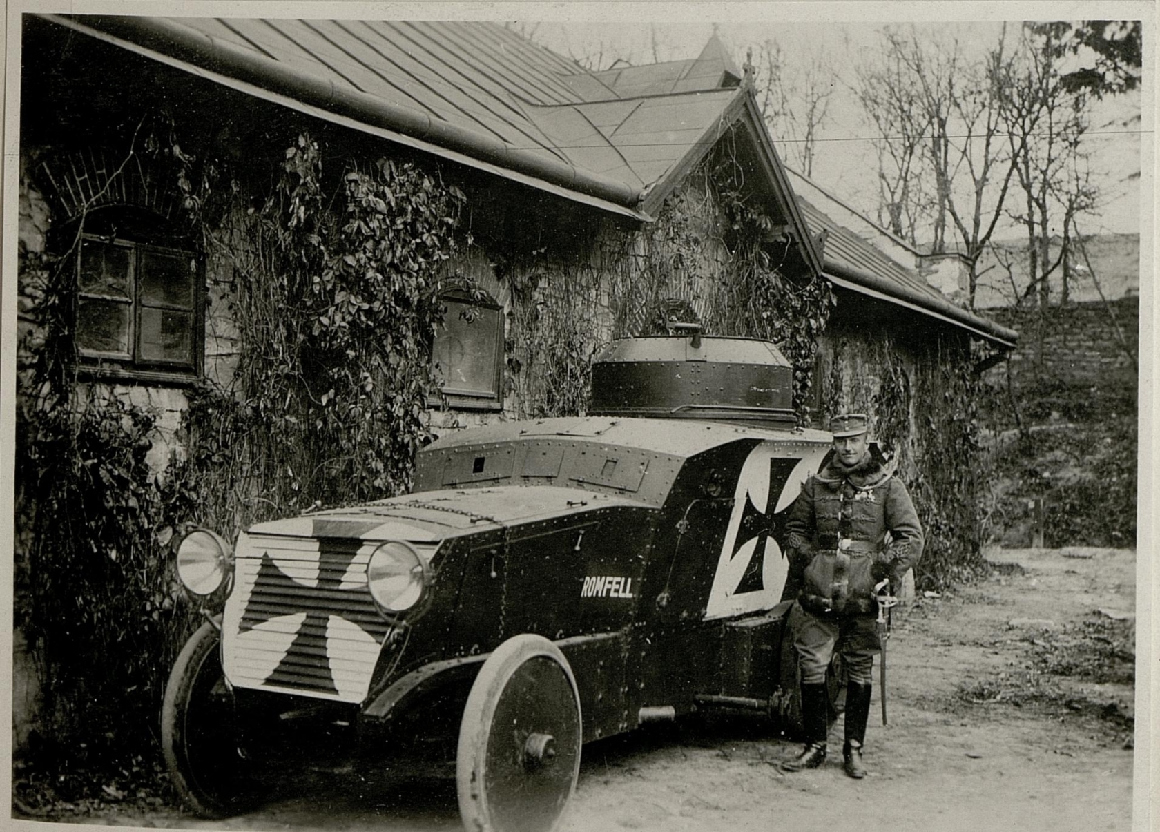 Panzerauto